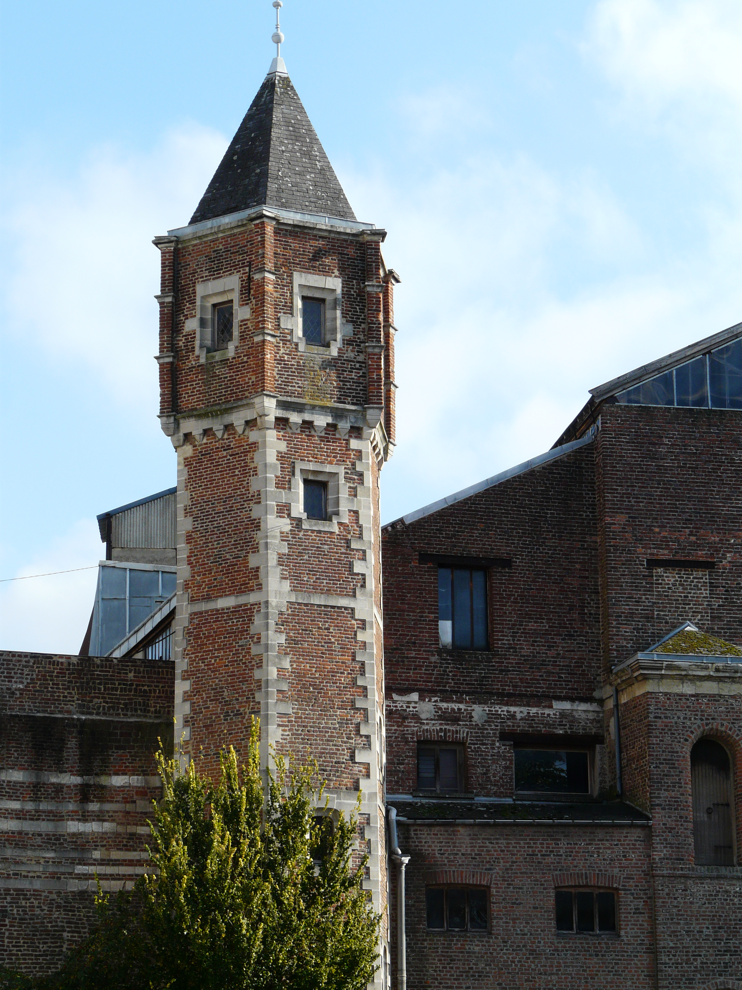 La tour de la maison du bailli de Marcoing à Cambrai : tourelle en bivrière du XVIe siècle